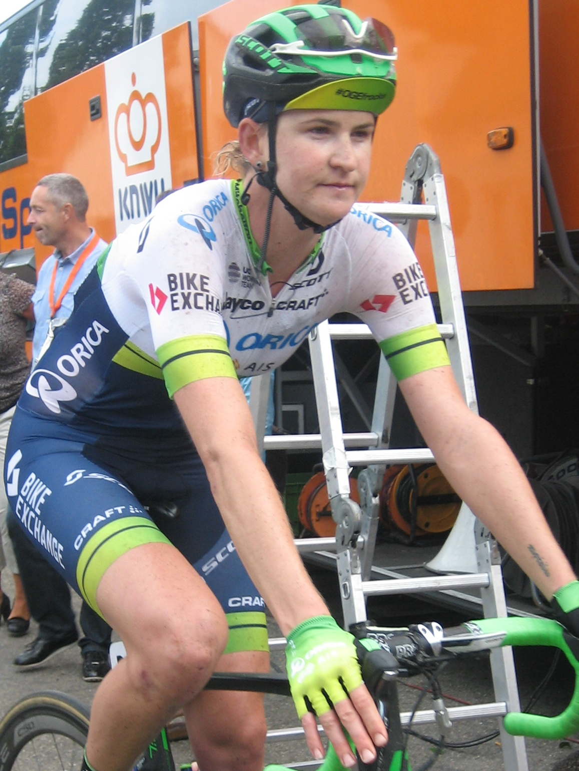 Loren Rowney na de finish van de 6e etappe van de Boels Ladies Tour 2016 op de Cauberg in Valkenburg, Limburg.